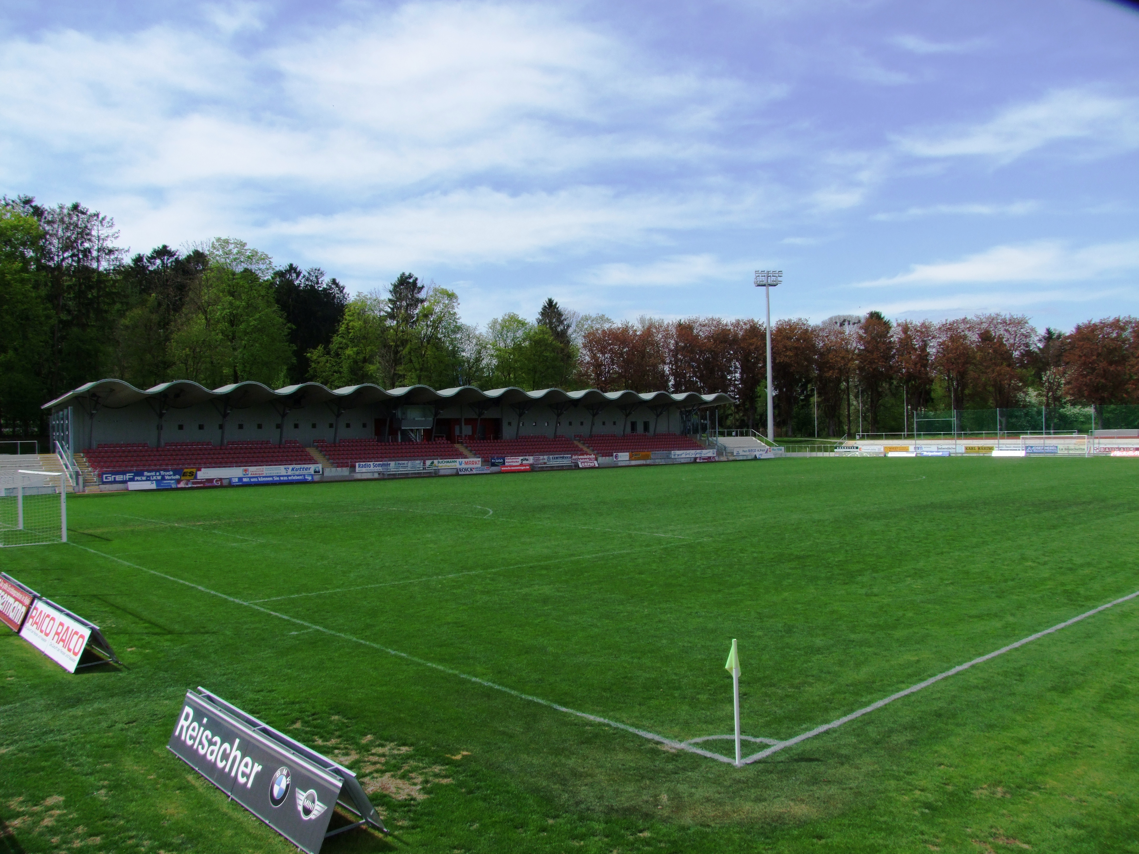 Die 2008 eröffnete Fußballarena des Bayernligisten FC Memmingen und des BSC Memmingen im Memminger Süden.